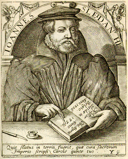 Johannes Sleidanus (* 1506; † 1556), deutscher Jurist und Diplomat